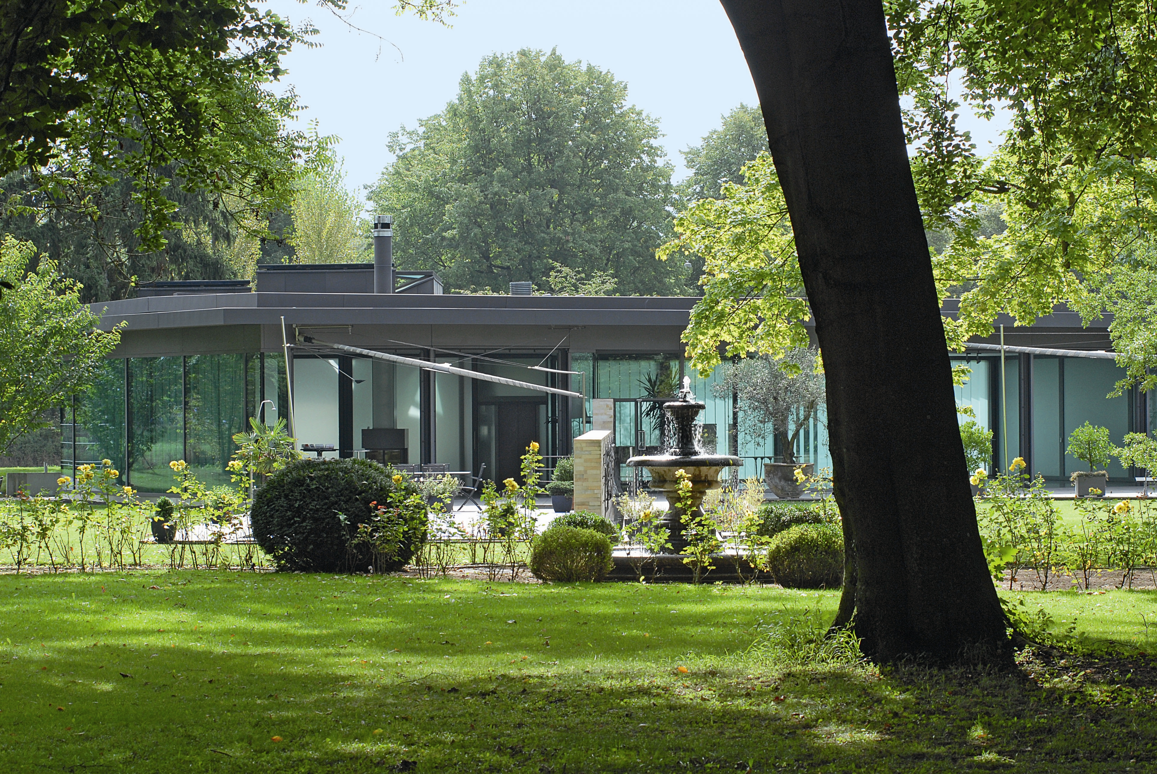 Der moderne Hirzen Pavillon (Gauer Itten Messerli Architekten AG) auf dem Bäumlihofgut in Riehen (Schweiz) mit Zierbrunnen und Sträuchern, die von der feudalen Parkkultur vor hundert Jahren künden.